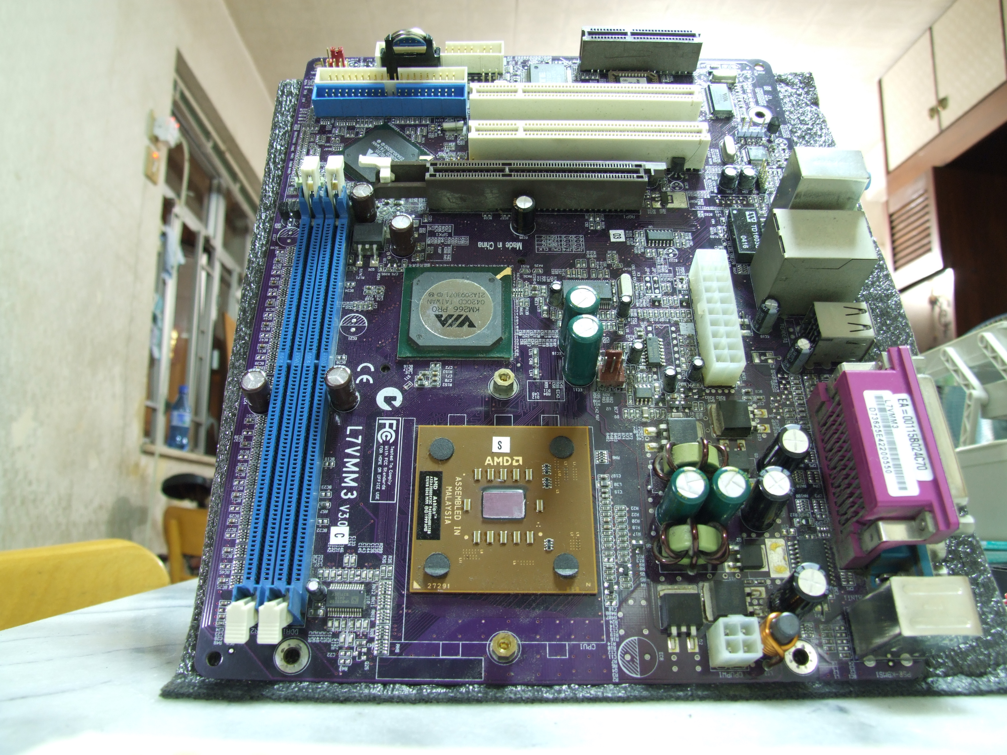 圖下方的晶片為中央處理器，直接焊於主板上的，為Socket A接位。左方藍色插槽為 DDR SDRAM 記憶體插槽，中間的電腦晶片為北橋晶片，上左方的晶片為南橋晶片，南橋北橋晶片中間的啡色插槽為AGP 插槽，於2005年開始已開始被淘汱，由 PCI-E 插槽取代。 许可协议 這是攝影者提供的圖片，現上傳至維基百科，不帶任何條件。